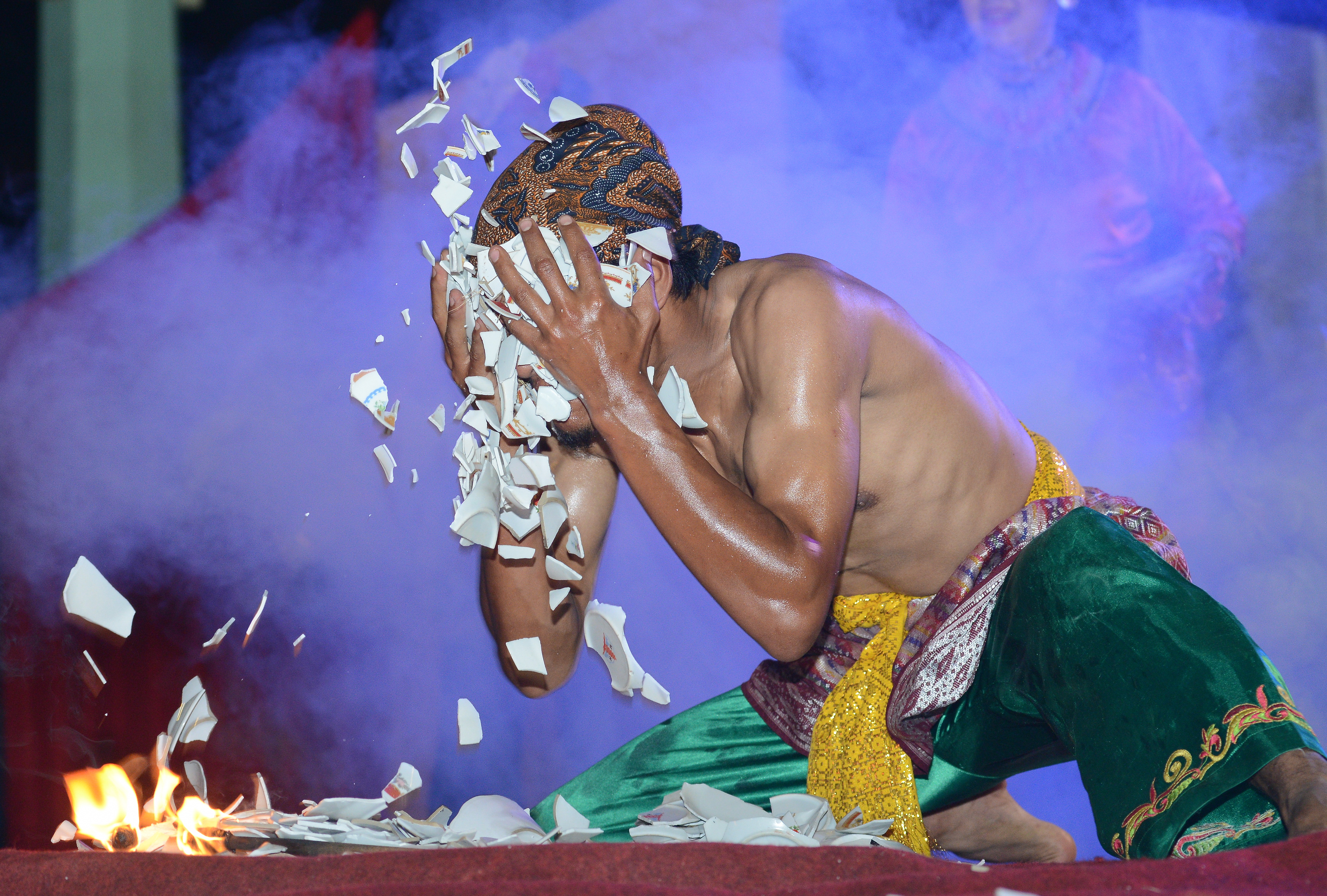 bukan saja menari di atas pecahan kaca...Membasuh muka dengan kaca, juga menjadi bagian atraksi yang menarik dalam pagelaran Tari Piring.